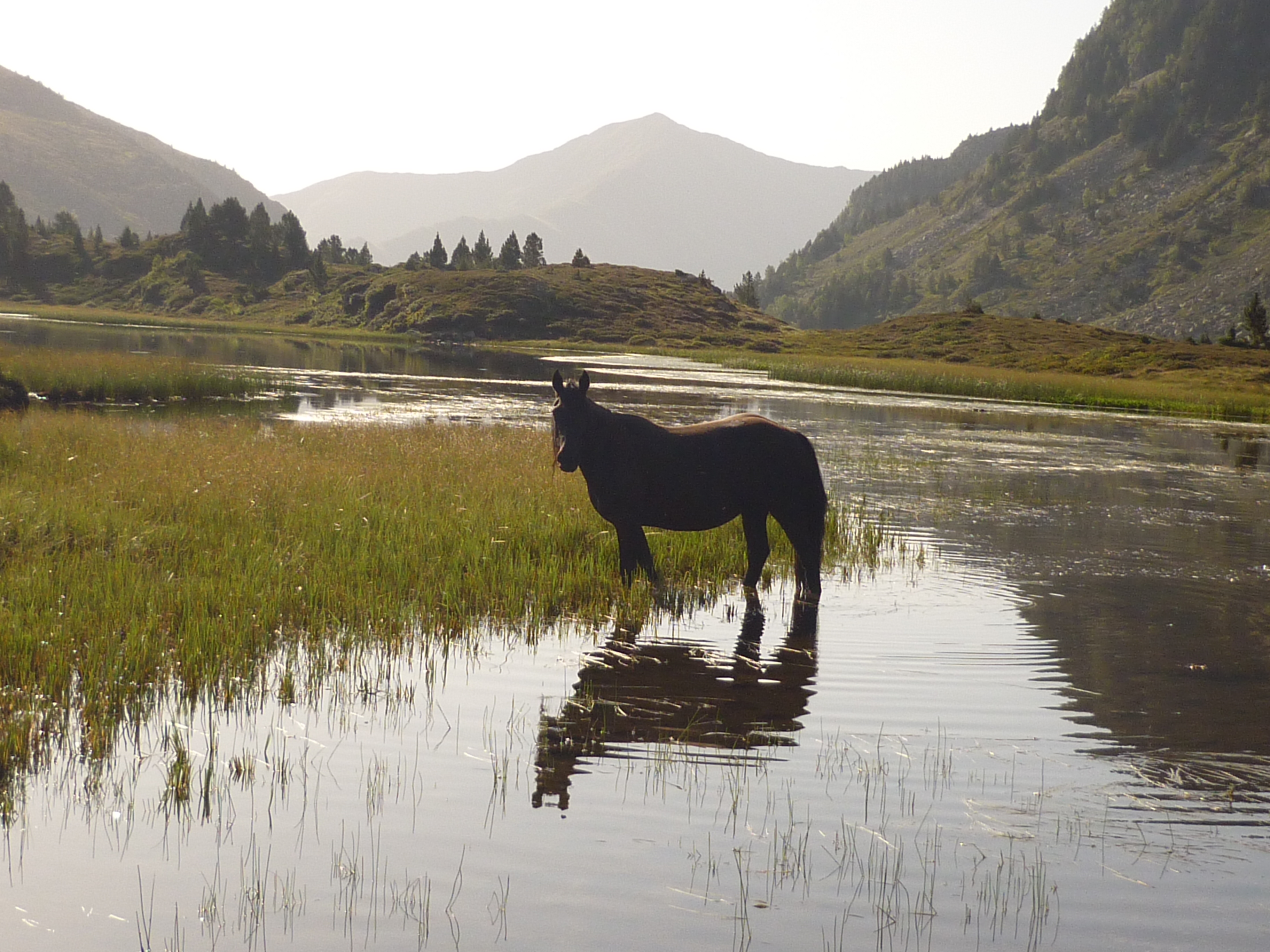 les étangs de Bassiès en été, montagne d'Ariège, pays des chevaux de Mérens